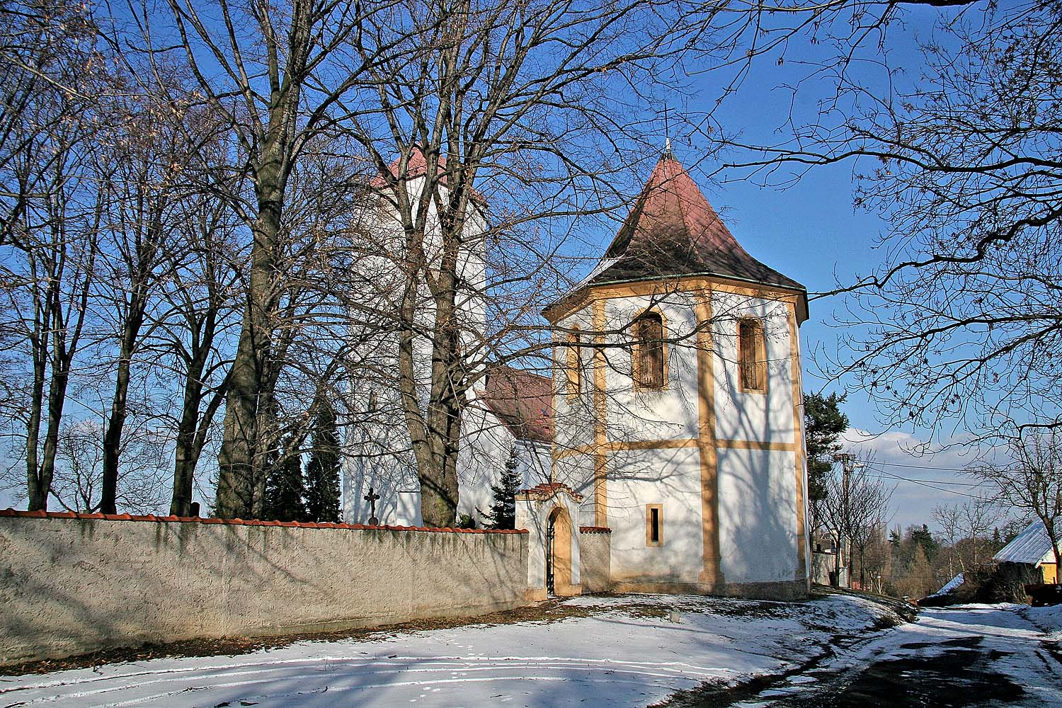 Kostel Nanebevzetí Panny Marie se zvonicí v obci Kbel v okrese Kolín autor: Prazak date: 27. 2. 2006